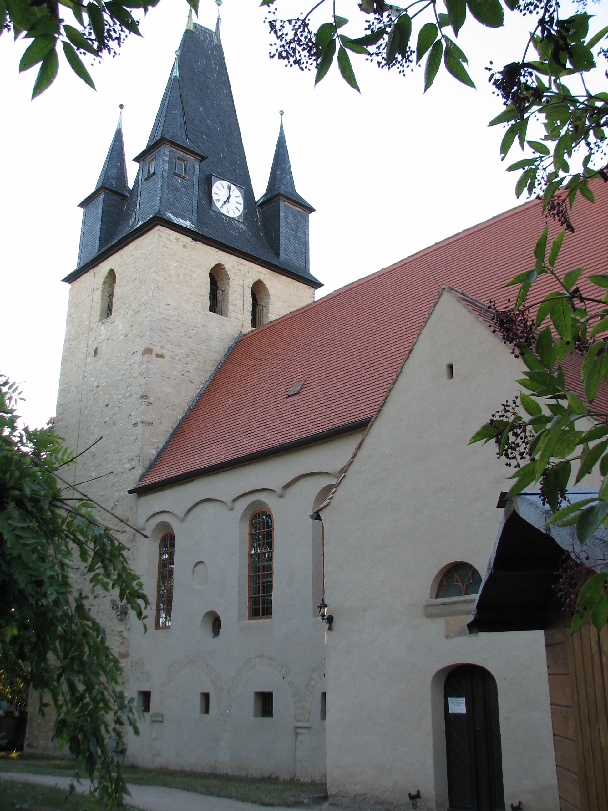 Die Kirche im August 2016